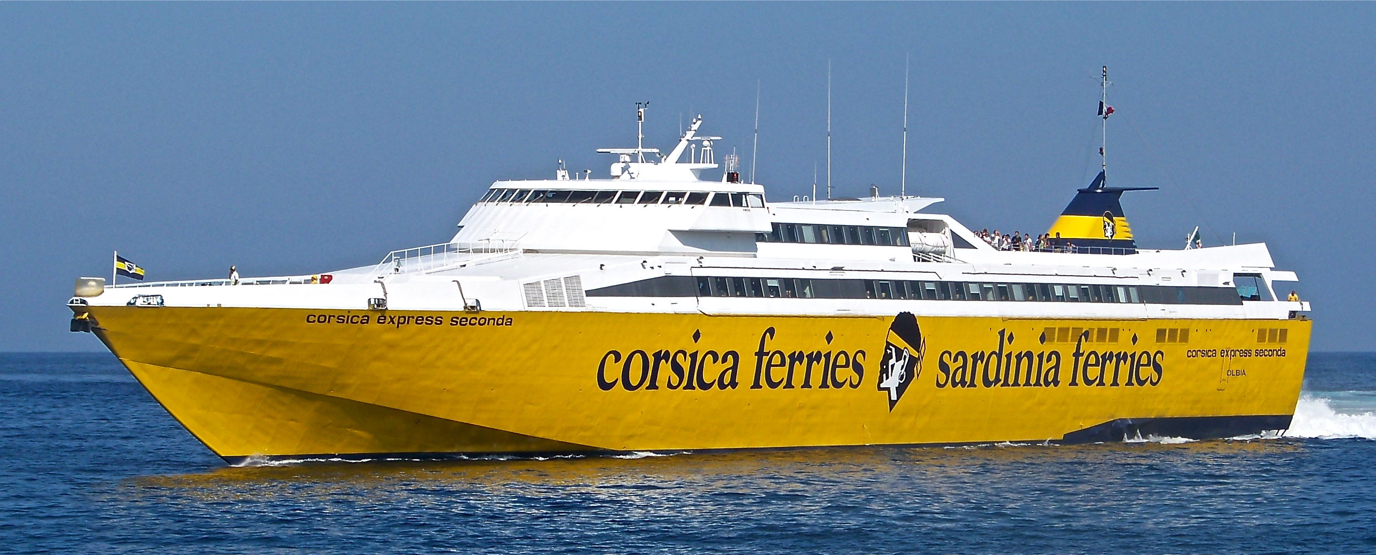 le Corsica Express, Navire à Grande Vitesse de corsica ferries à Bastia.